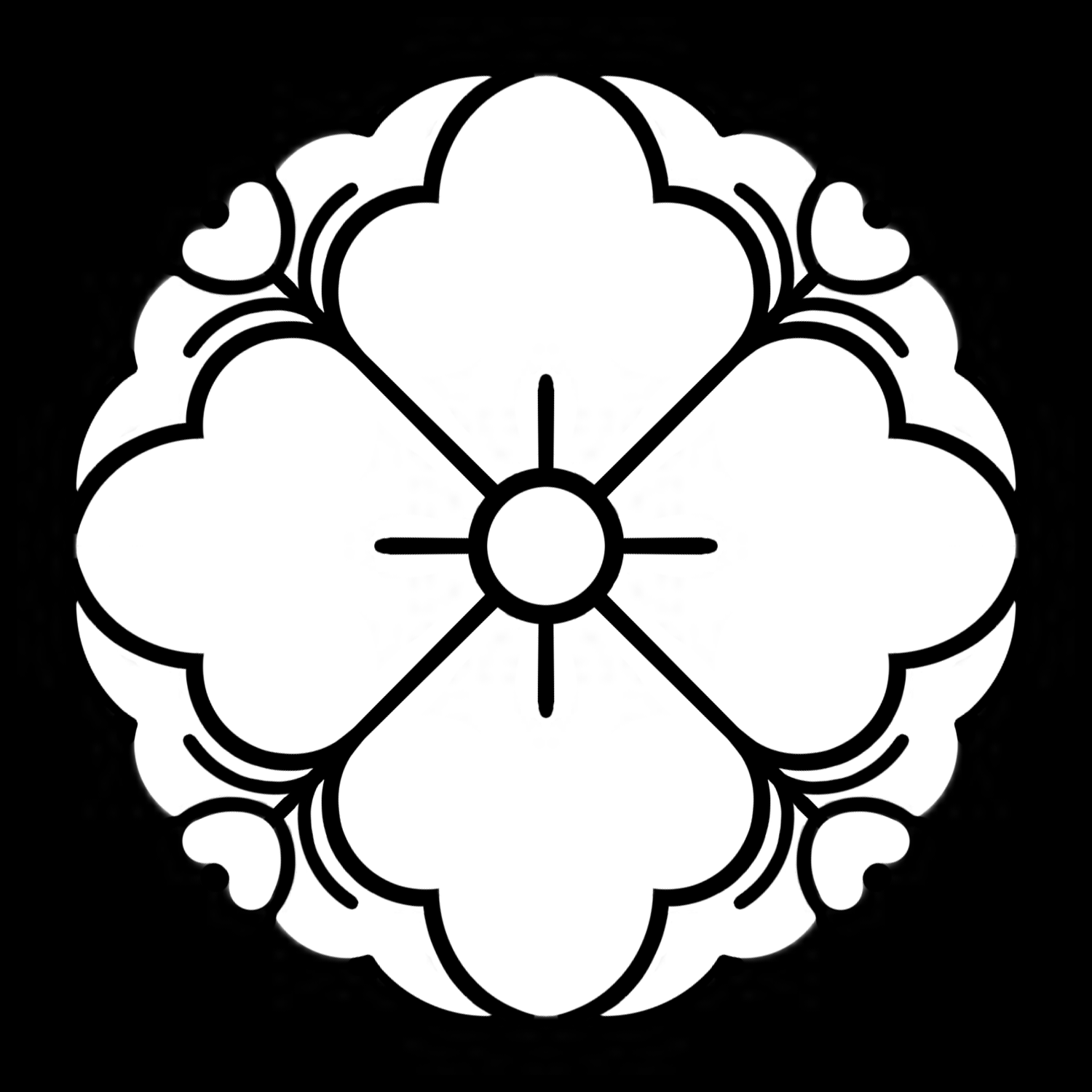 「三条花角」紋（染抜）